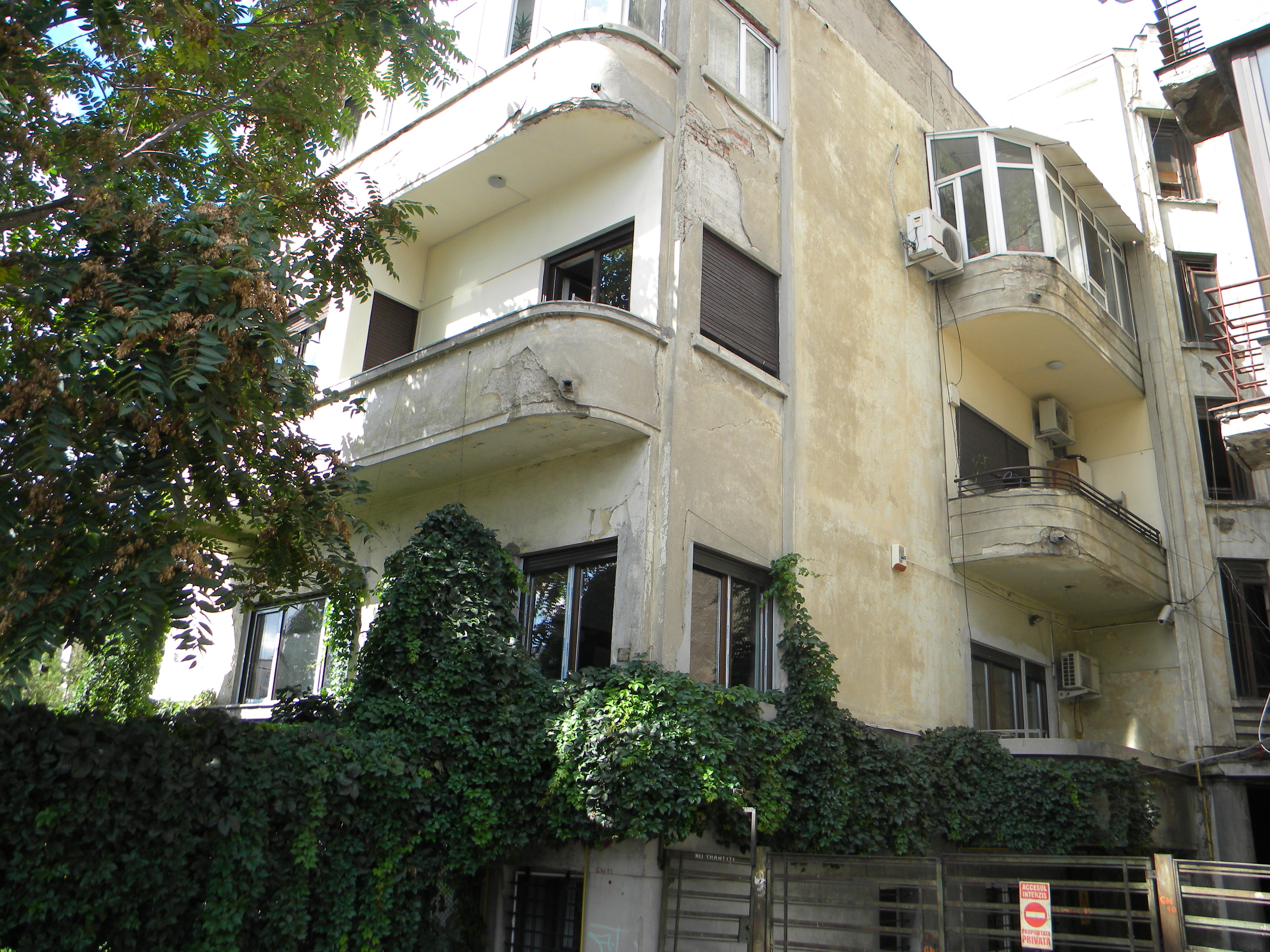 Bucuresti, Romania, Bd. Corneliu Coposu nr. 39B